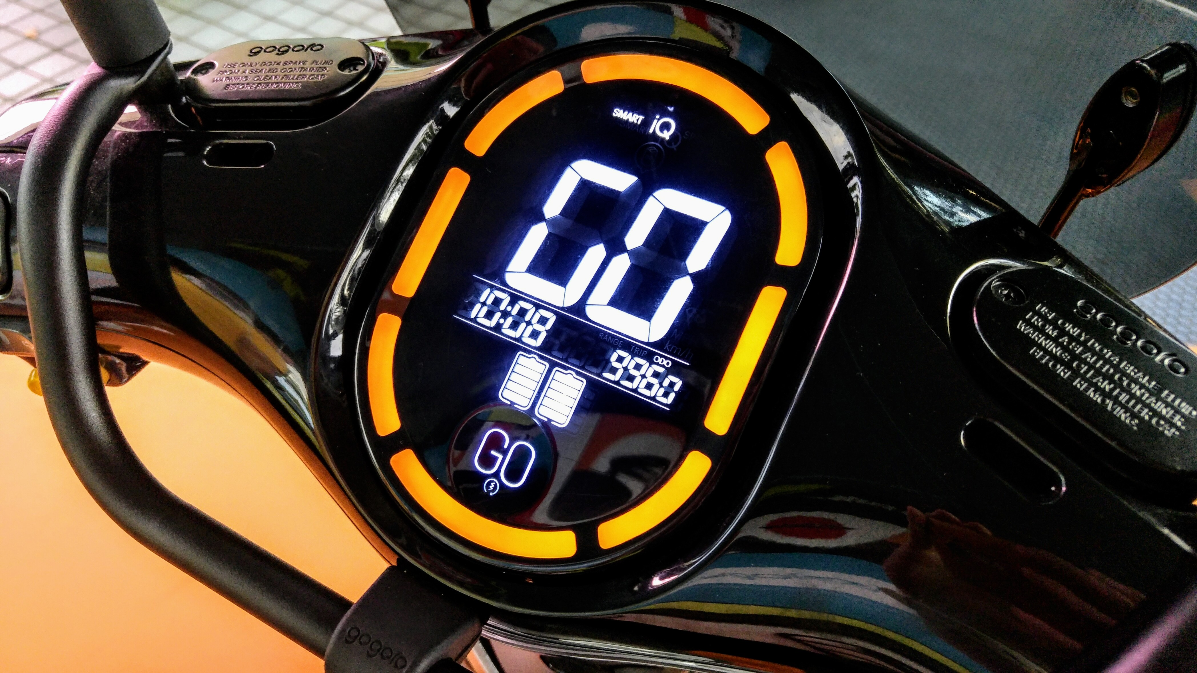 Gogoro 2 Series 的行車儀錶板，與後期推出的儀錶板改裝飾桿，可令加裝手機座更佳便利。